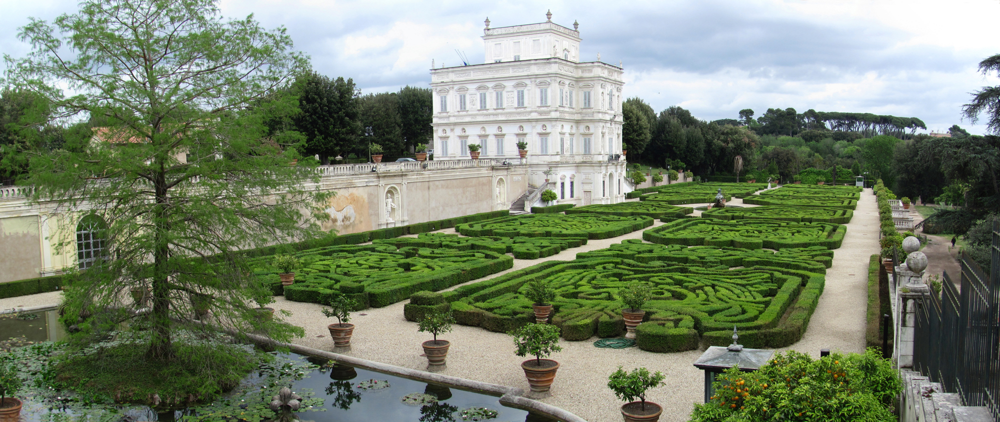 Quartiere XII Gianicolense, Roma, Italy